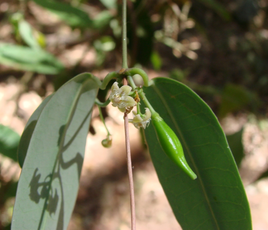 Macroditassa adnata - ASCLEPIADACEAE - Parque Estadual Serra dos Pirineus - Pirenópolis - Goiás - Brasil.